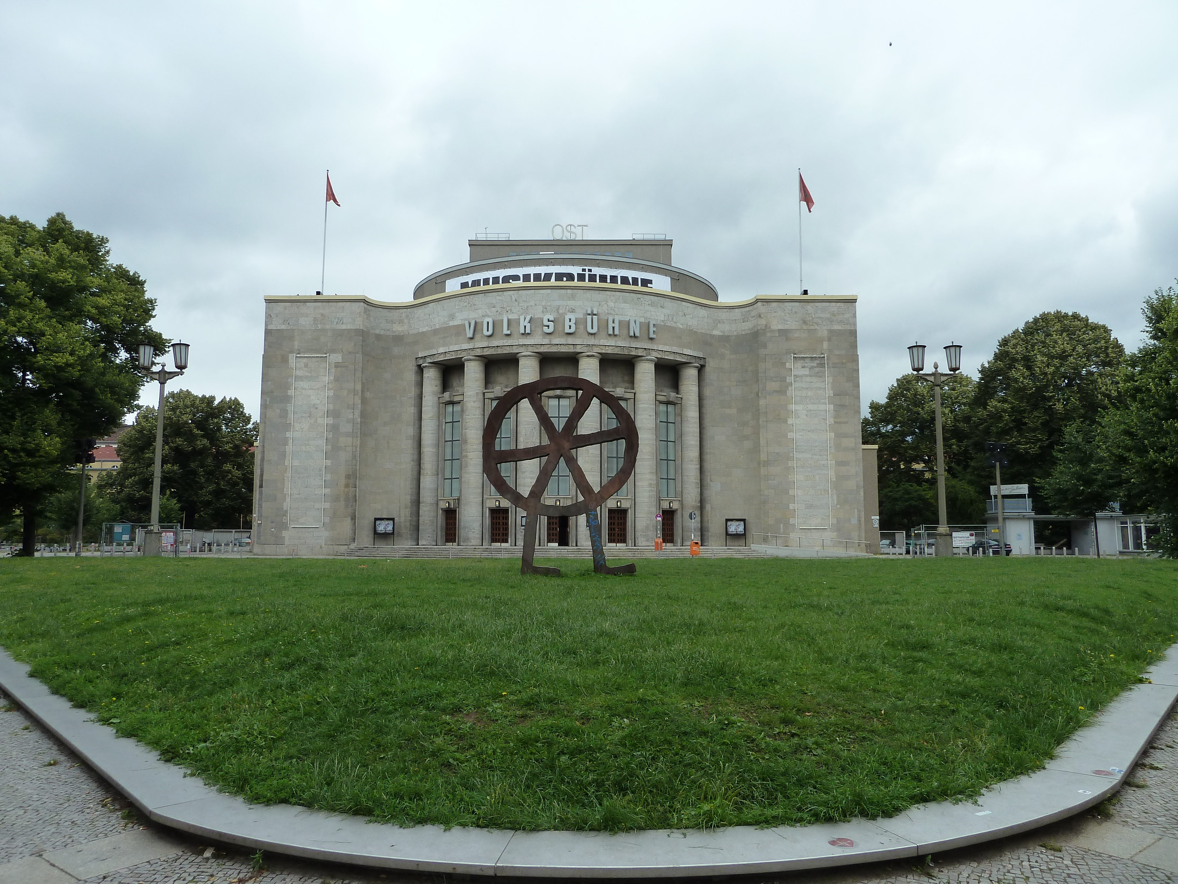 Volksbühne, Rosa-Luxemburg-Platz 1This is a photograph of an architectural monument.